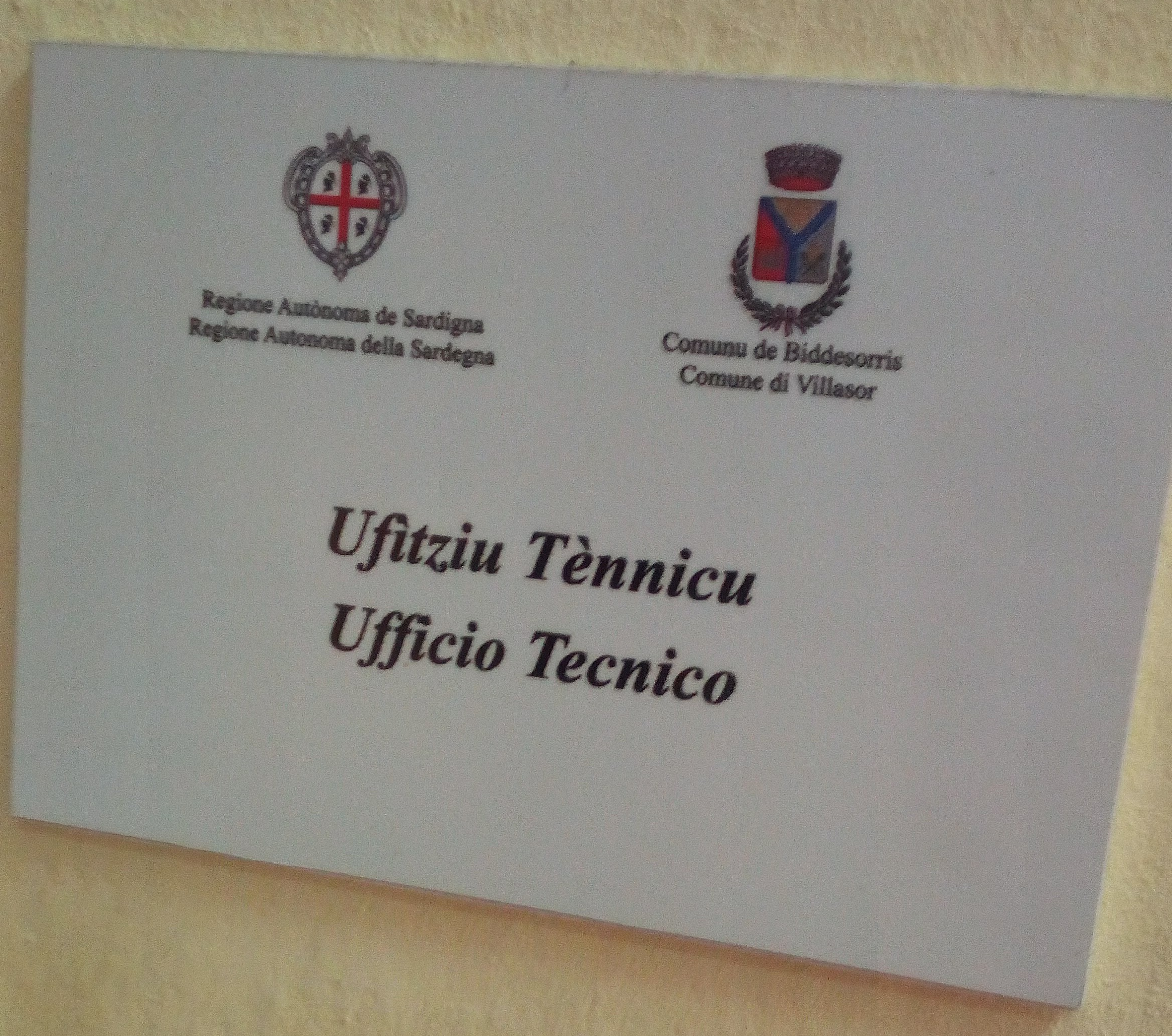 Cartello bilingue Italiano-Sardo, posto nel municipio del comune di Villasor, recante la scritta "Ufficio Tecnico" in italiano e "Ufitziu Tènnicu" in sardo. Sono presenti inoltre lo stemma del comune di Villasor e della Regione Autonoma della Sardegna, con relative didascalie bilingue.